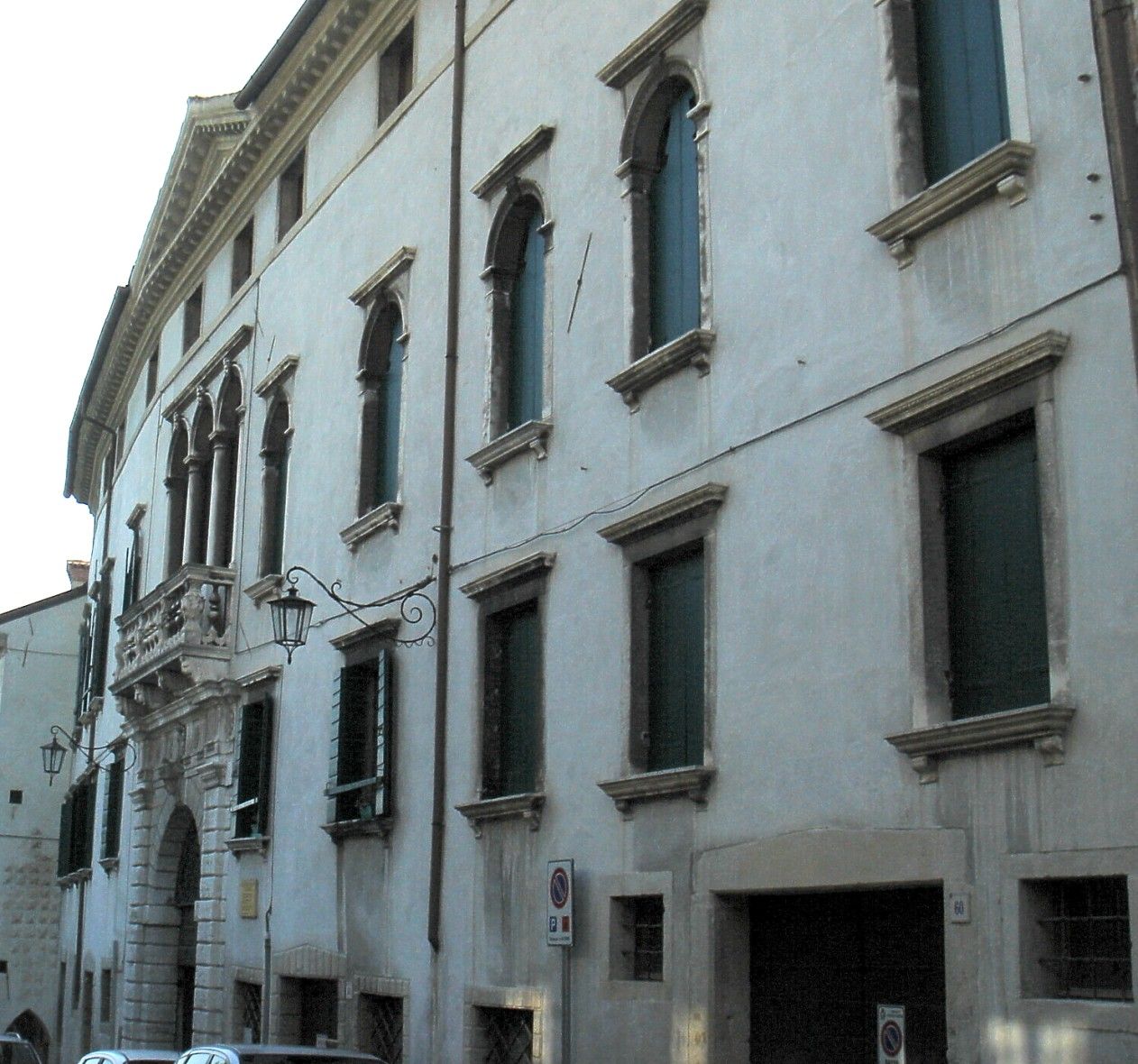 Serravalle di Vittorio Veneto (Treviso): Palazzo Cesana della Riva Lucheschi.